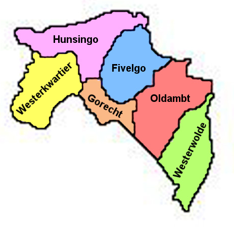 Die historischen Grenzen der Gebiete in der heutigen Niederländischen Provinz Groningen.